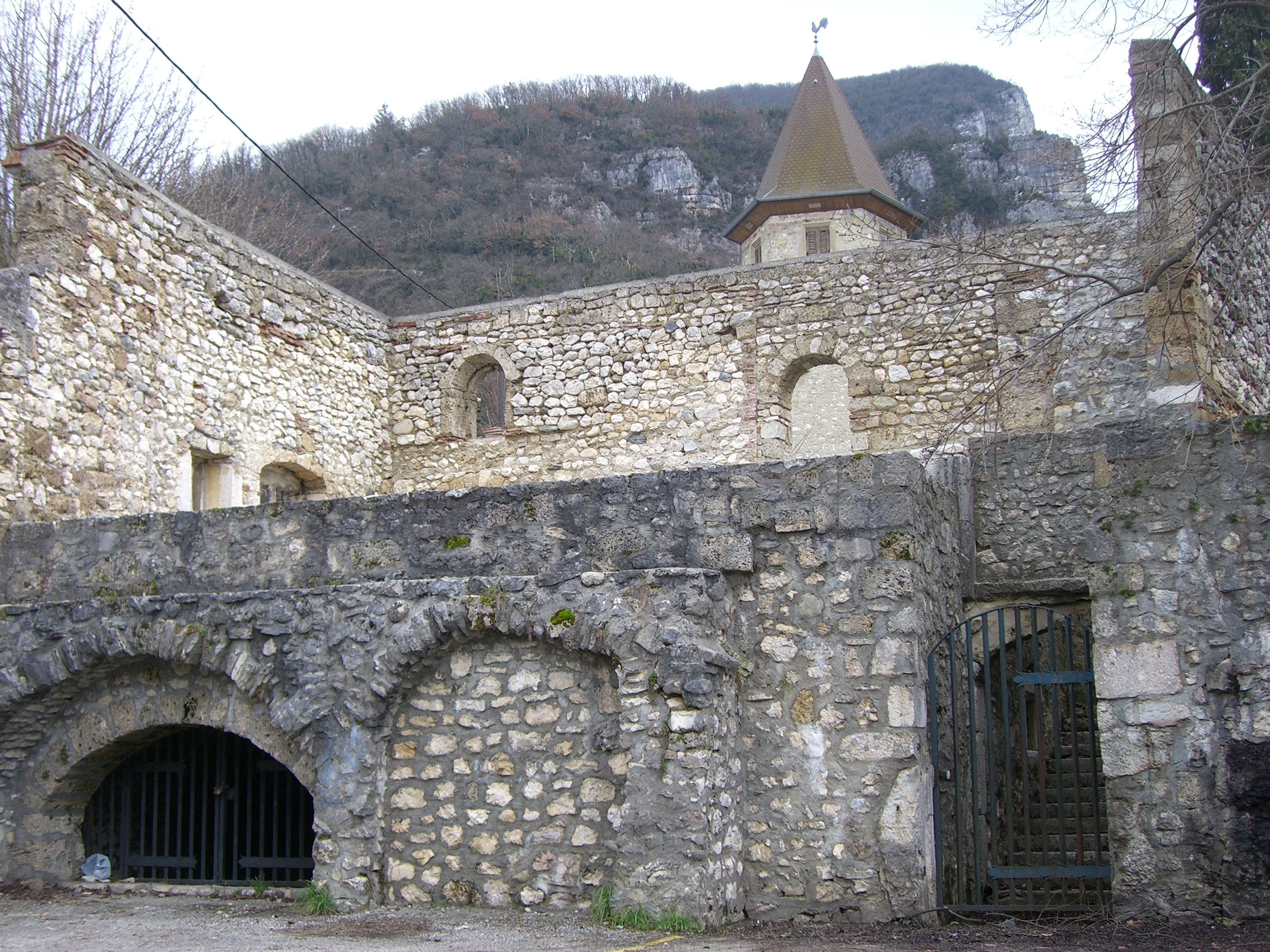 Un vieux château dans les rues de Cognin-les-Gorges.